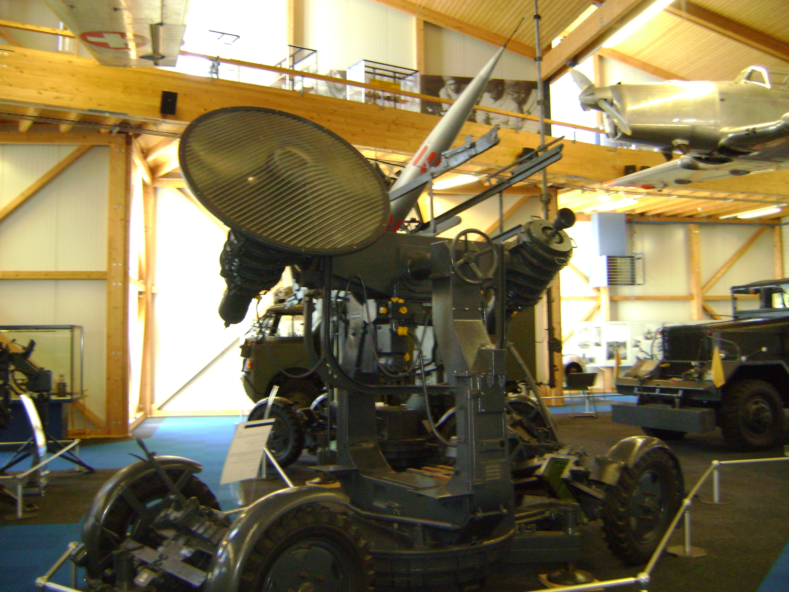 RSA Leitstrahl